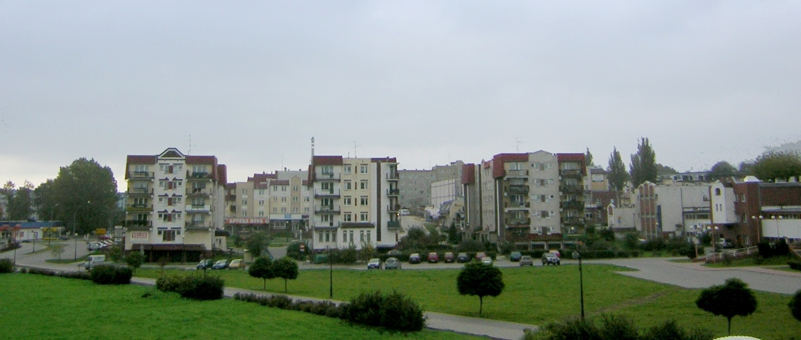 Widok na osiedle Kopernika w Iławie od północy